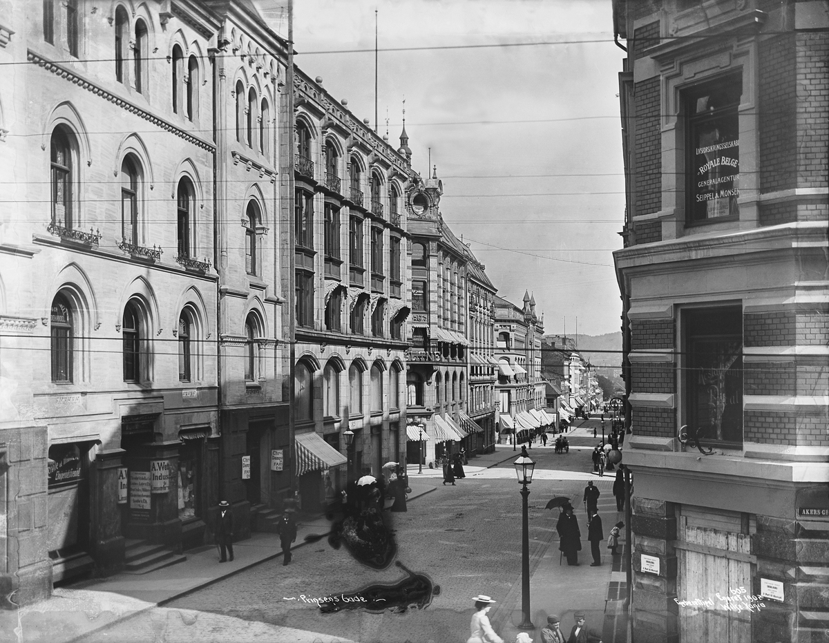 Prinsens gate i Oslo, 1902